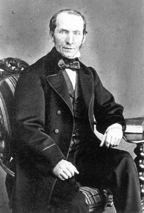 Wopke Eekhoff (1809-1880)